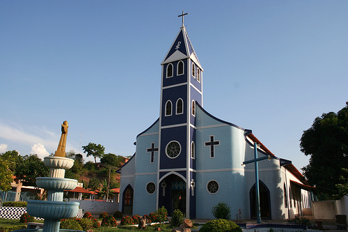 Matriz de Esperantinópolis - MA